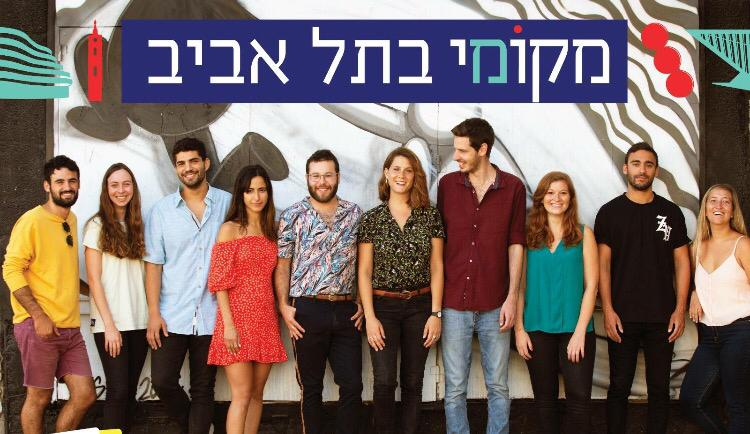 קהילת מקומי בתל אביב